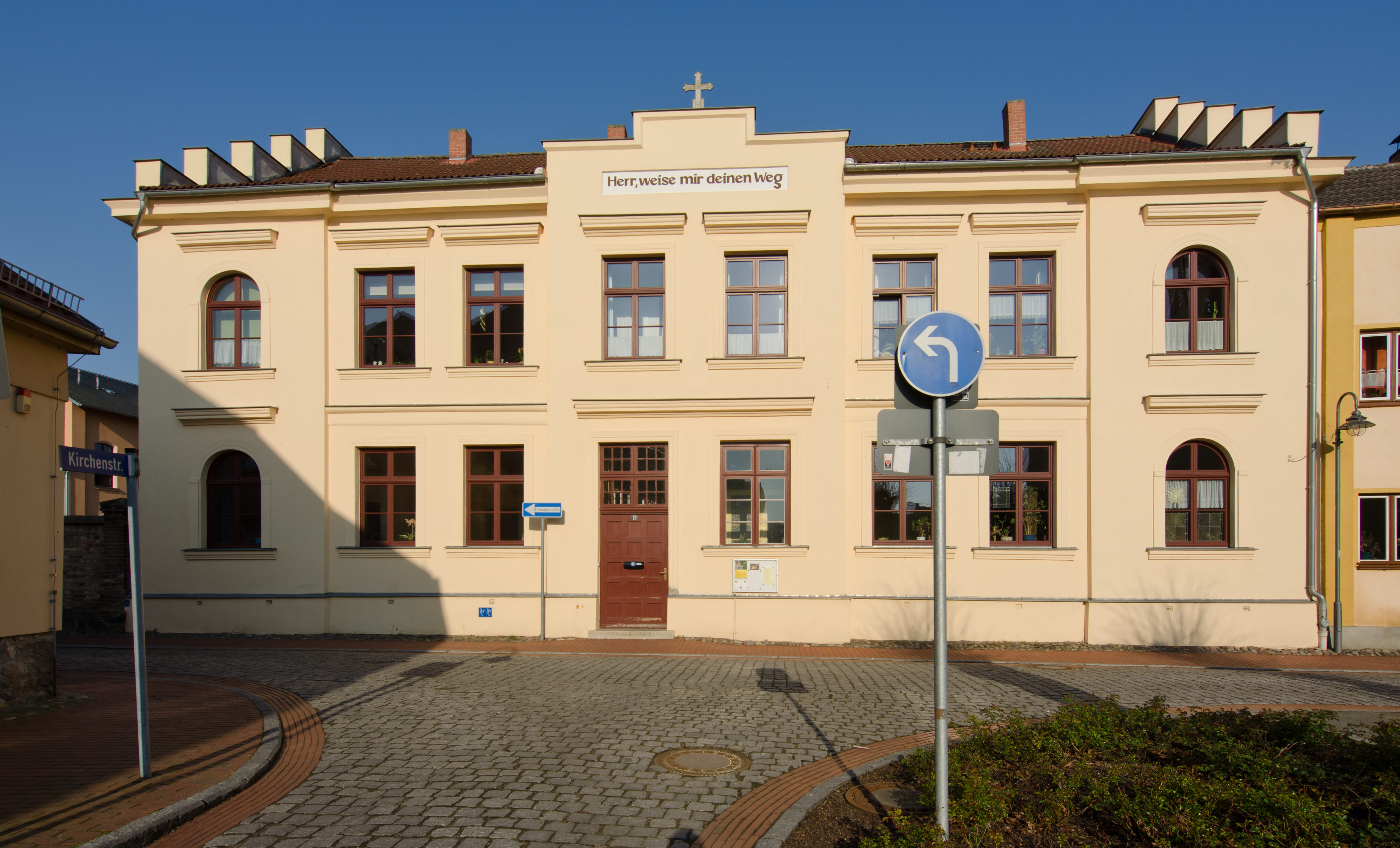 Schwaan Schulstraße 12